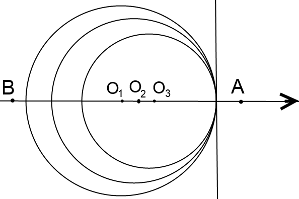 Deplasarea sursei sonore 2